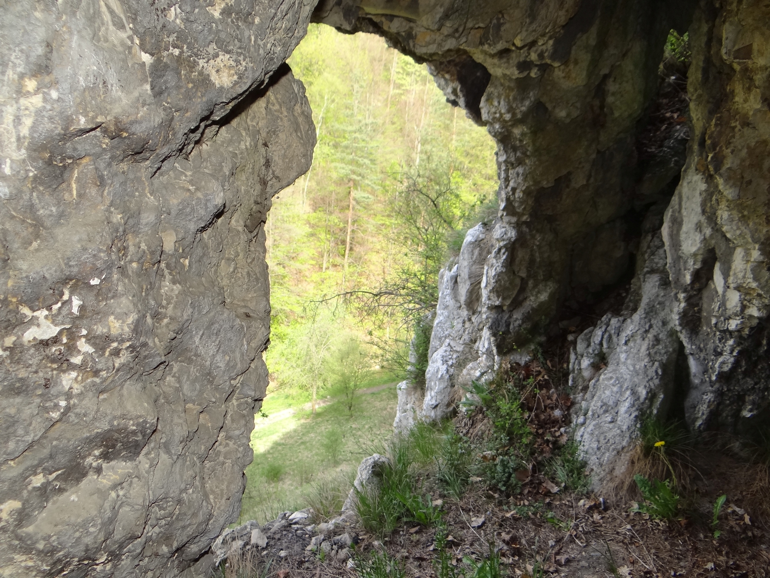 Okno Sokole I w Dolinie Bolechowickiej